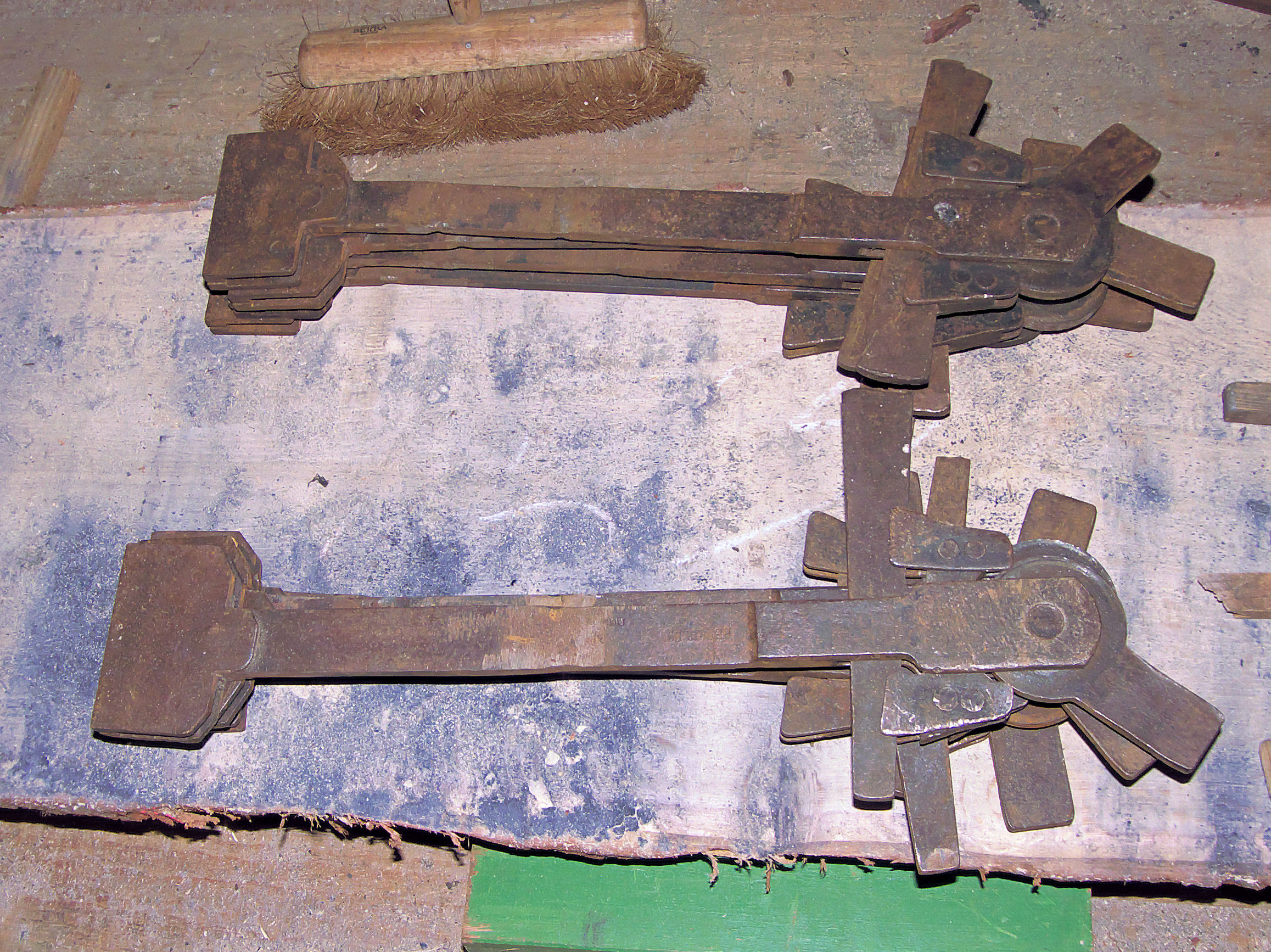 Molen Het Jonge Schaap, kluchten of onderhengelsels voor het vastzetten van het zaagblad in het zaagraam